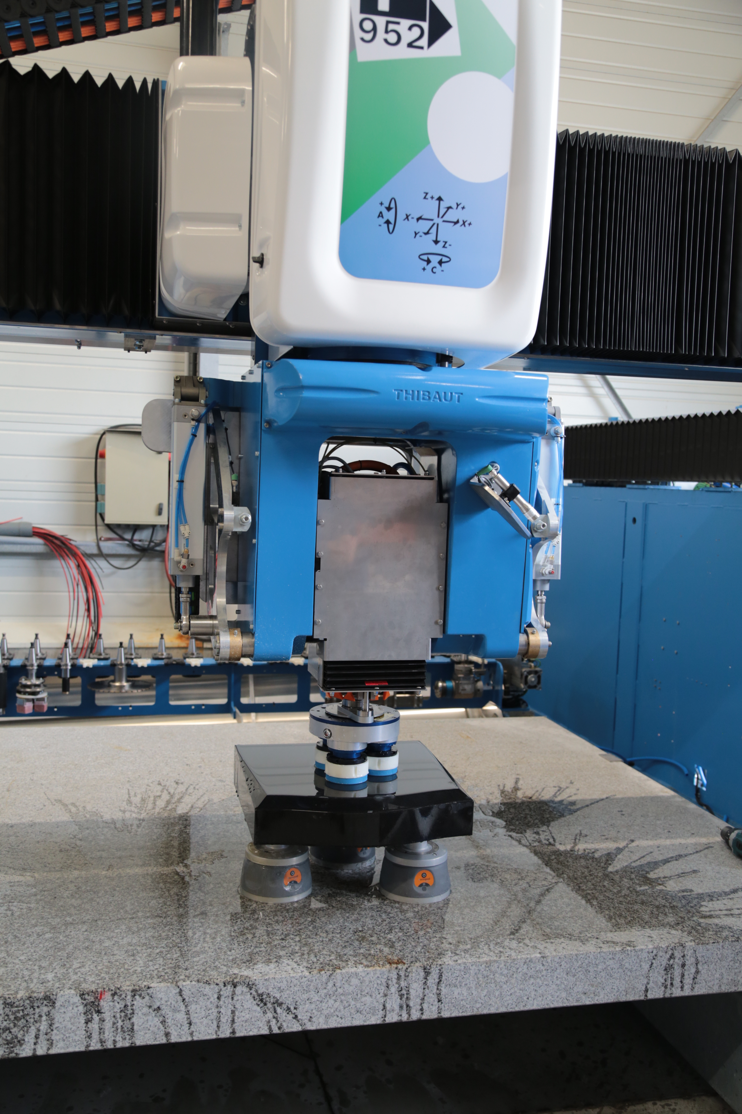 Machine outil à commande numérique pour le polissage de la pierre.